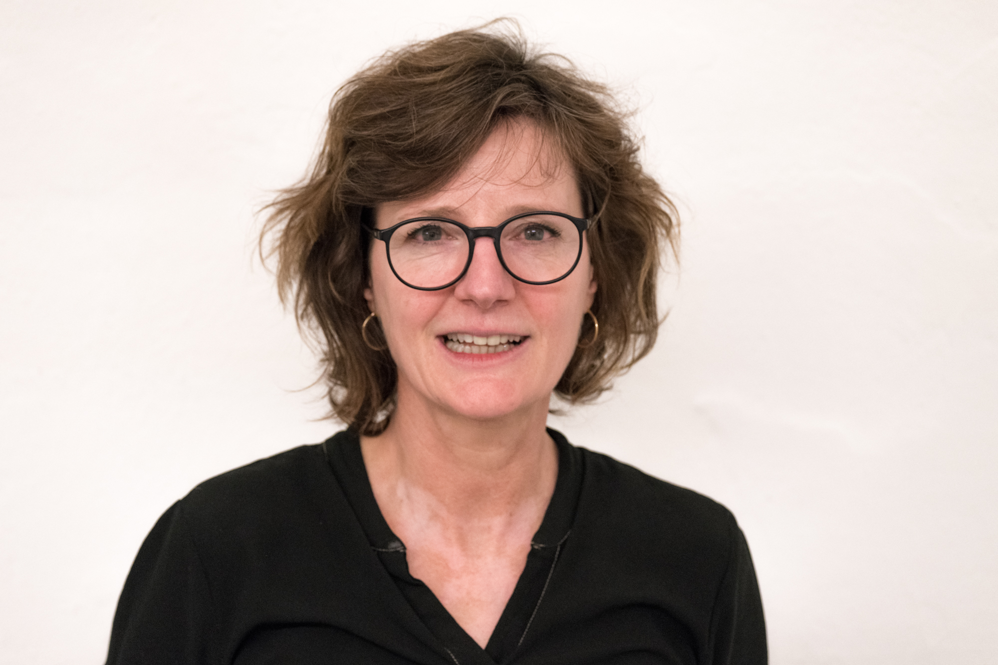 Doris Knecht im Linzer Posthof (2019)